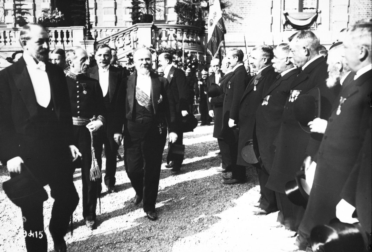 Le président de la République Raymond Poincaré à Saint-Servan-sur-Mer, place Bouvet, le 30 mai 1914. Passage en revue des décorés de 1870. Cliché de l'agence Rol.